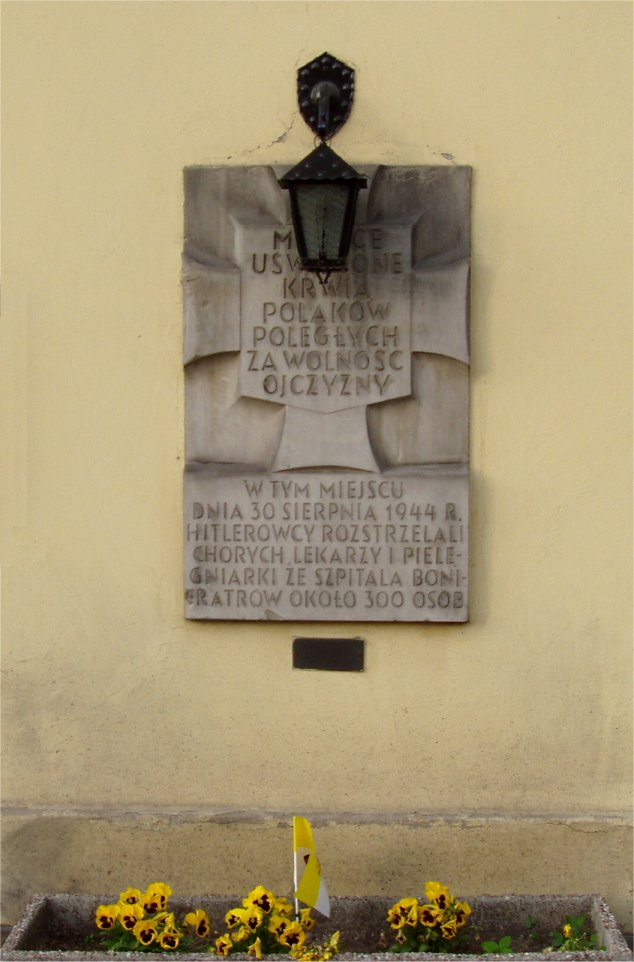 Szpital Jana Bożego - Bonifratrów, ul. Bonifraterska 12 w Warszawie (fot Zu)